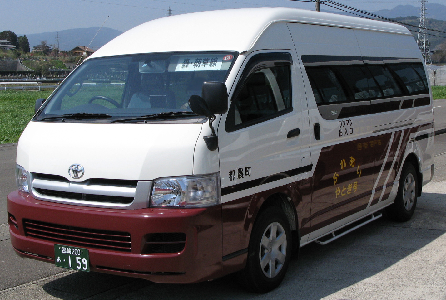 都農町地域福祉バス（あい交通委託） ふれあいやとぎ号の車両